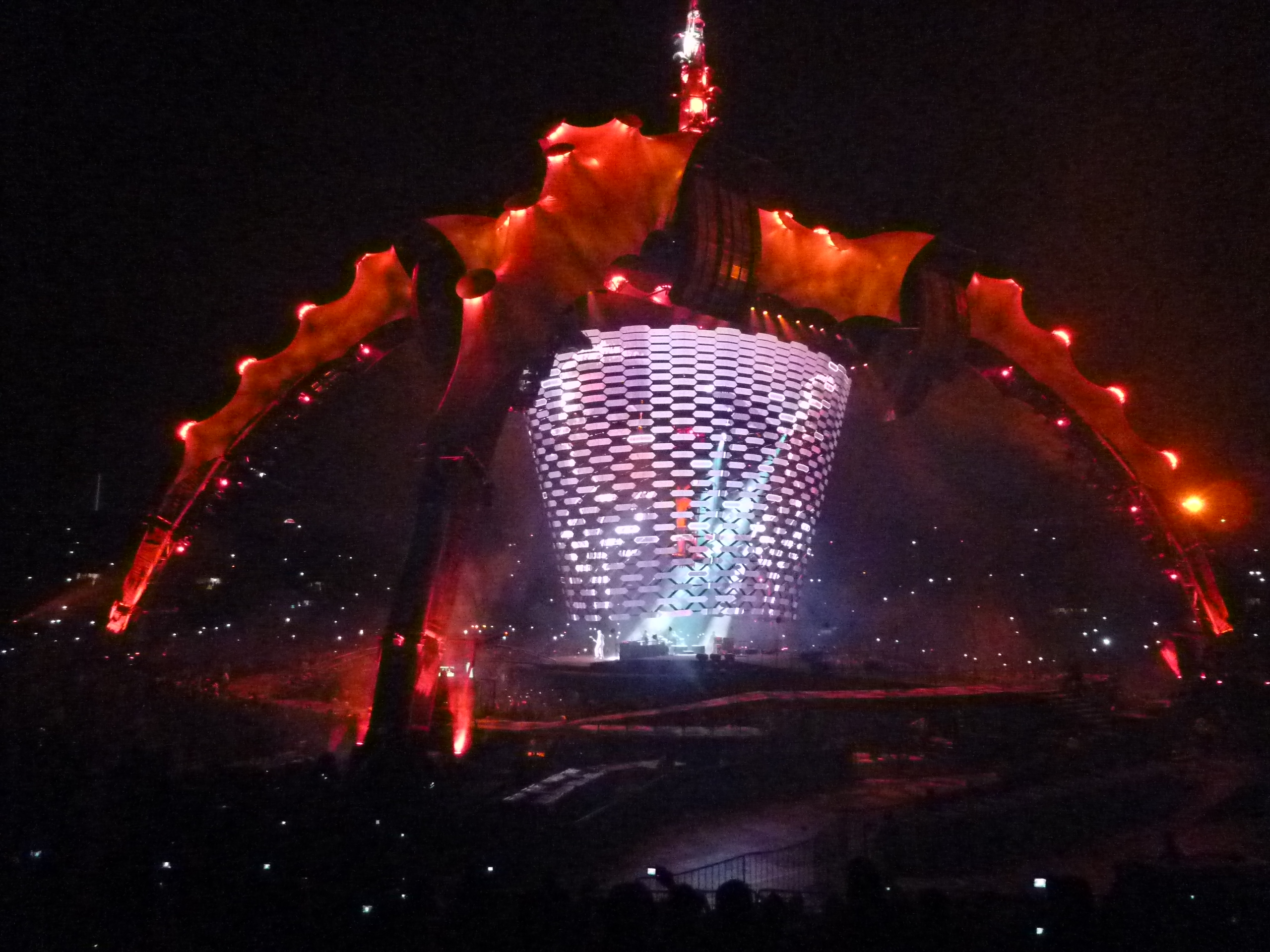 U2 360° Tour en Chile